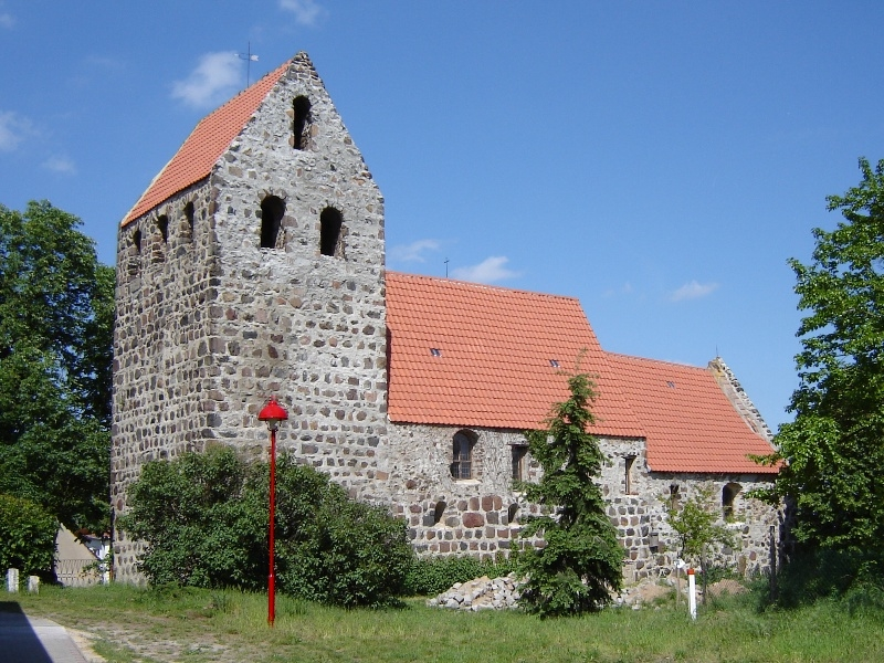 Kirche in Schermen, Sachsen-Anhalt in Deutschland